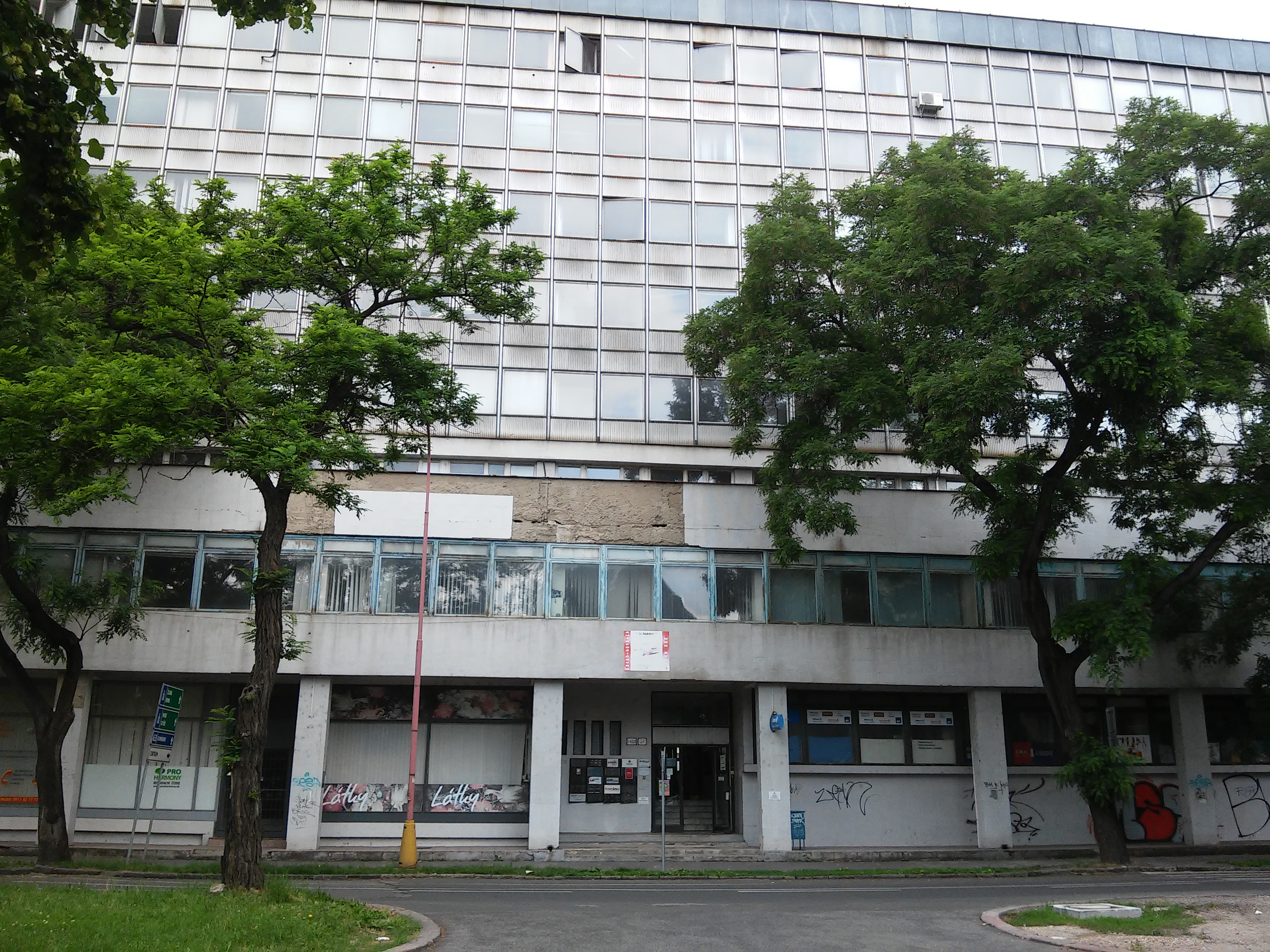 Košická, Sta